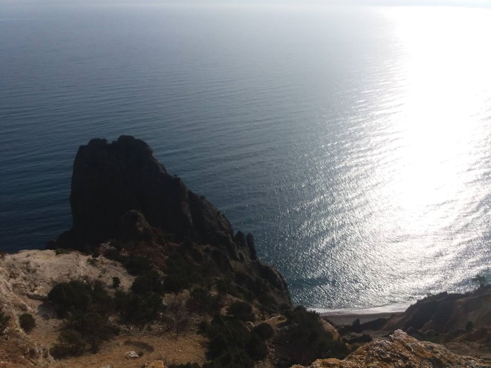 мыс Феолент, Севастополь.